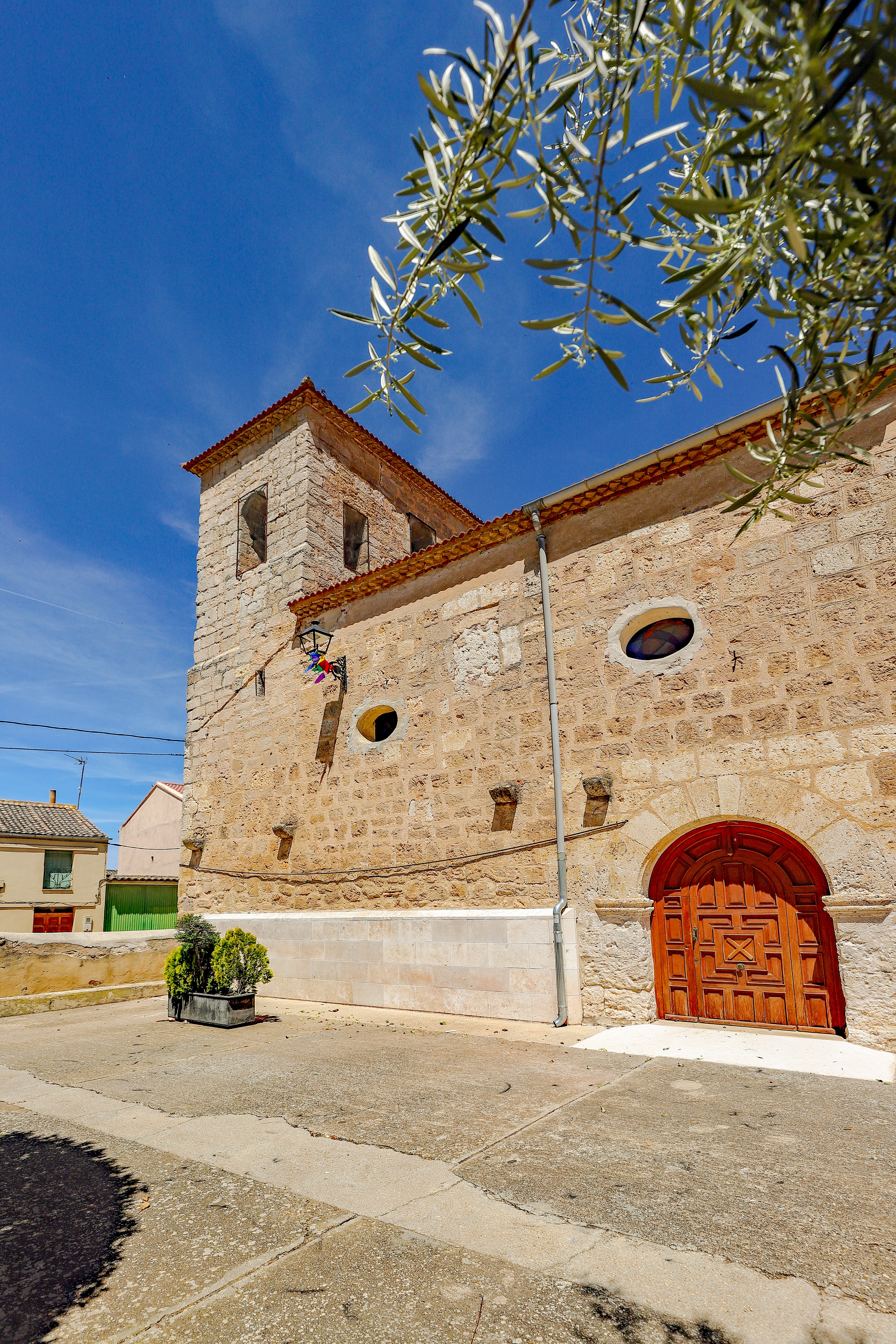 Berlangas de Roa es un municipio de la comarca Ribera del Duero, en la provincia de Burgos.